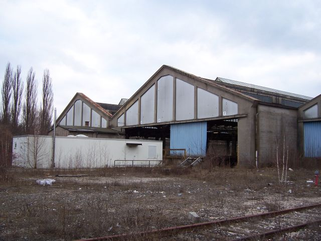 Güterbahnhof Nürnberg Süd